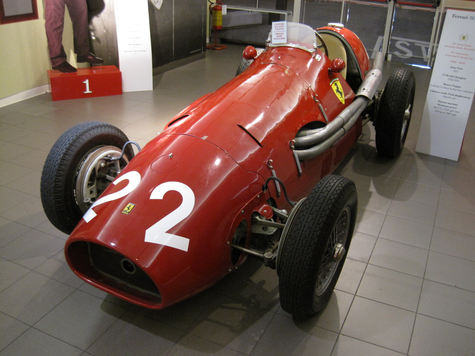 Automobiles in the Galleria Ferrari